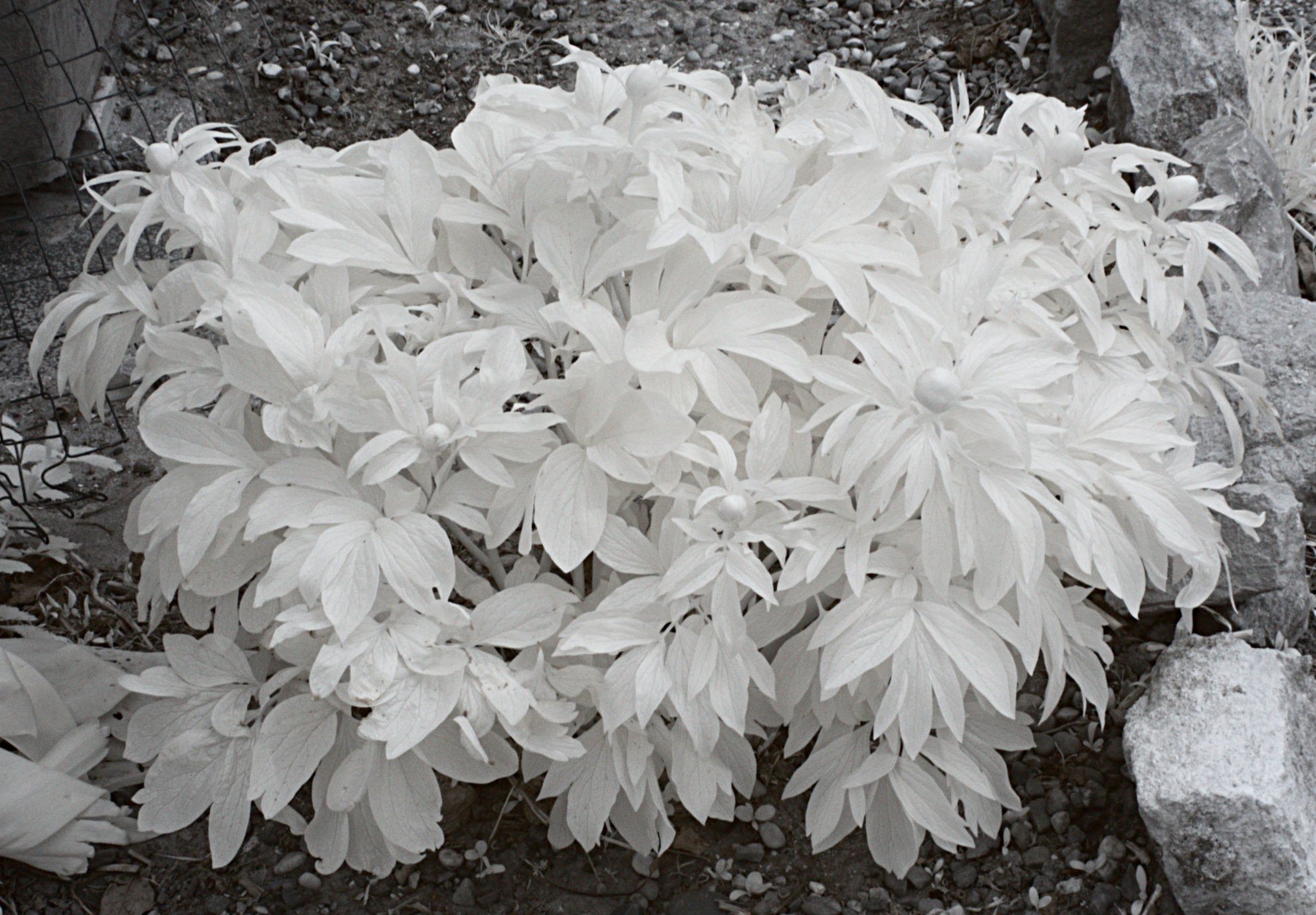 Paeonia officinalis, Pagny-le-Château (Côte d'Or, Bourgogne, France) photographié avec un filtre infrarouge 720 nm.